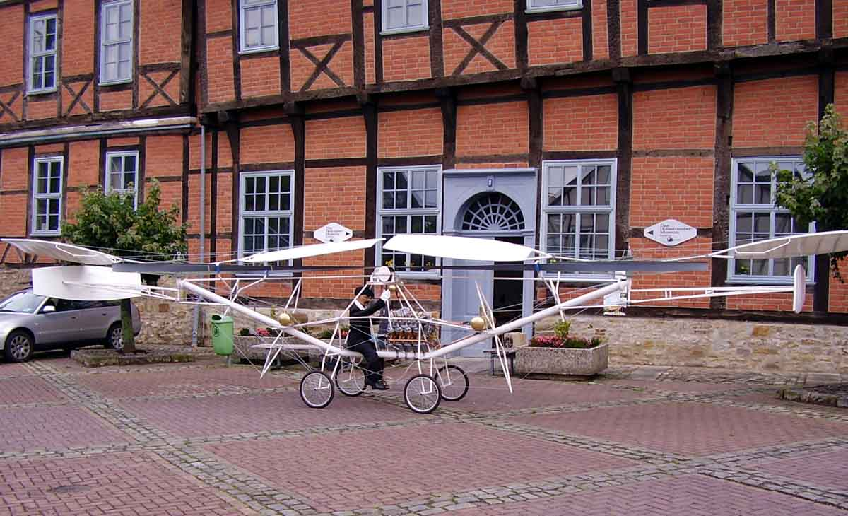 Nachbau des weltersten Hubschraubers Cornu Nr. 2 vor dem Hubschraubermuseum Bückeburg